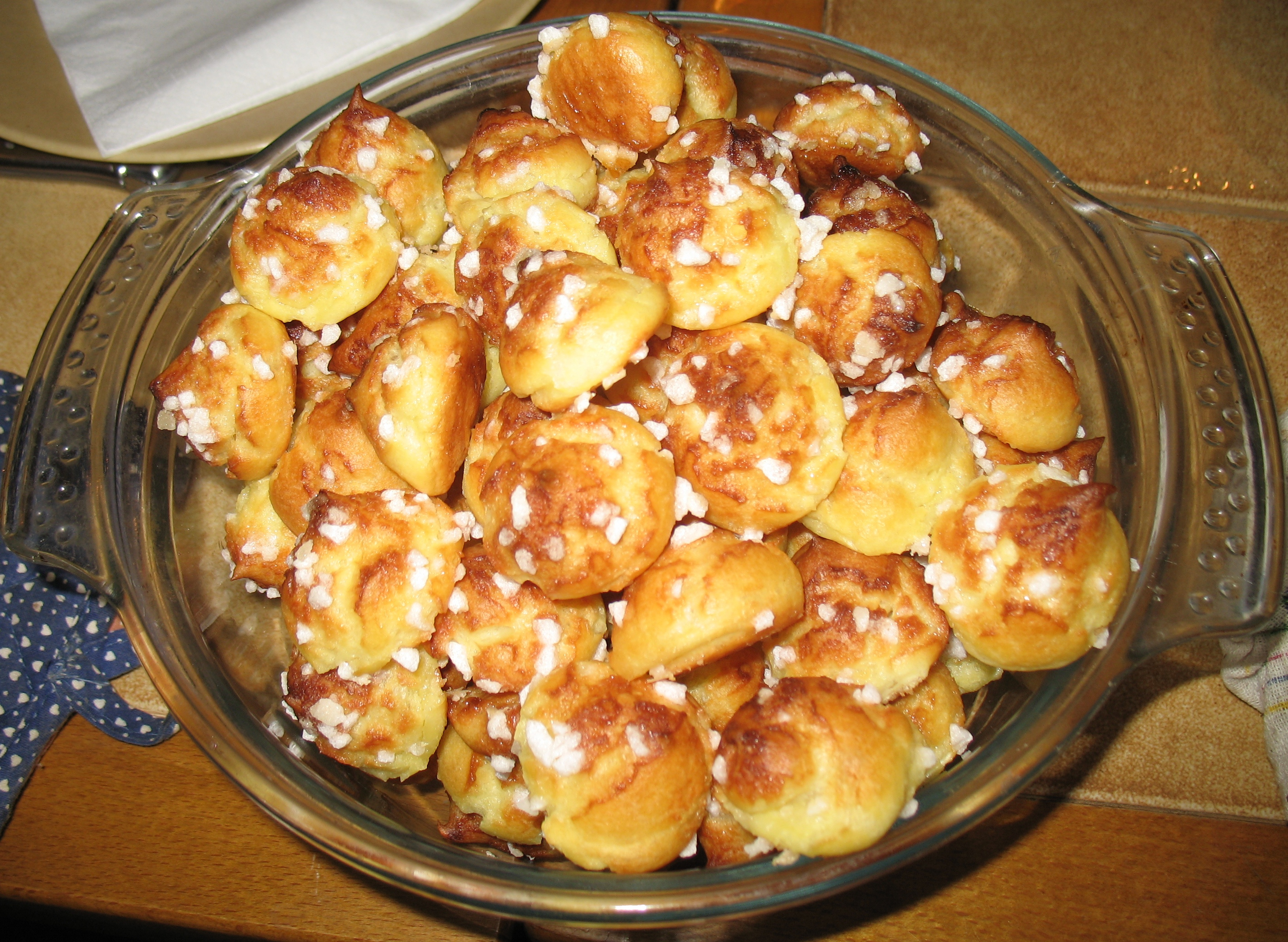 Chouquettes faites maison.